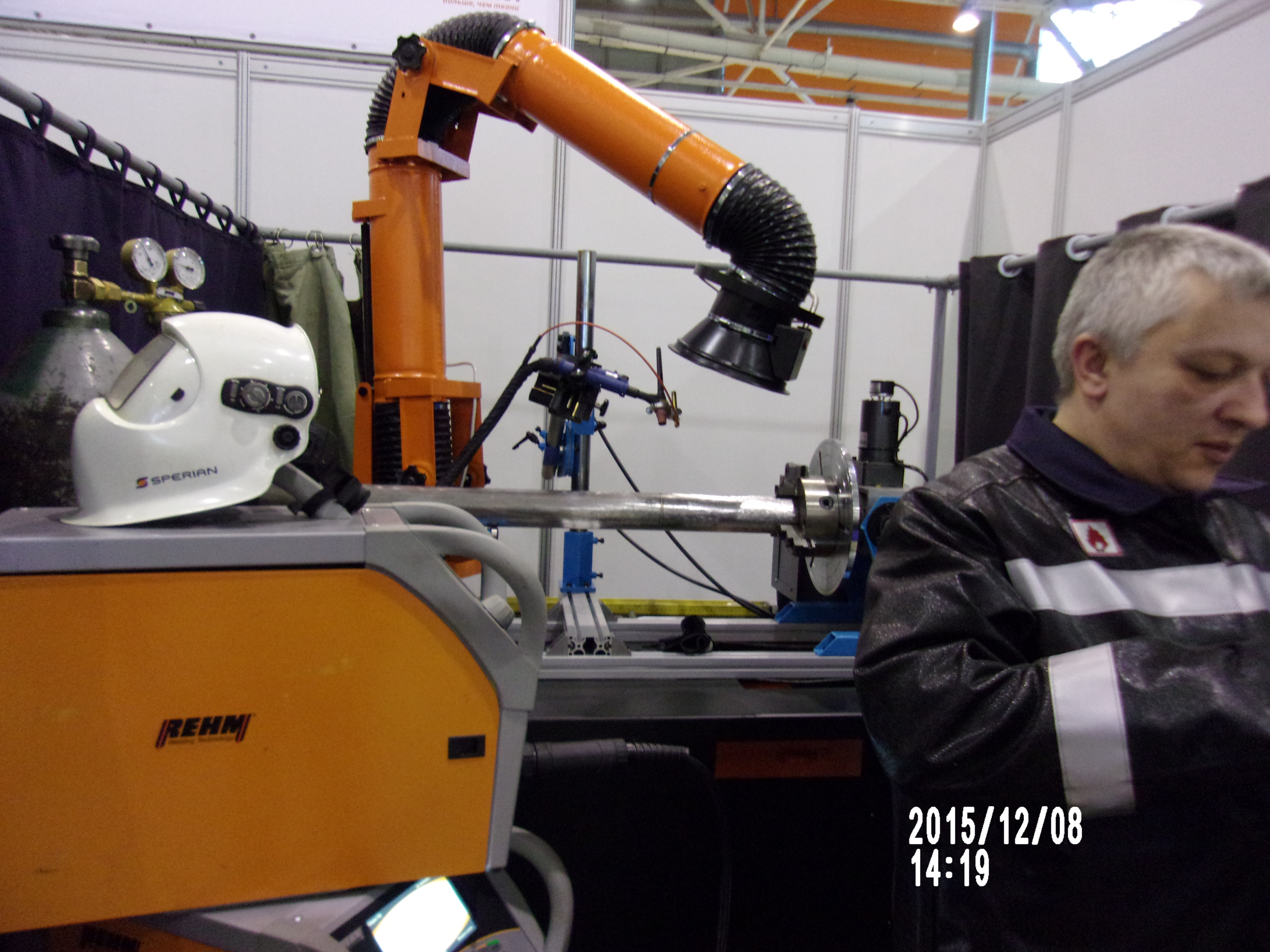 Местный вентиляционный отсос от источника воздушных загрязнений